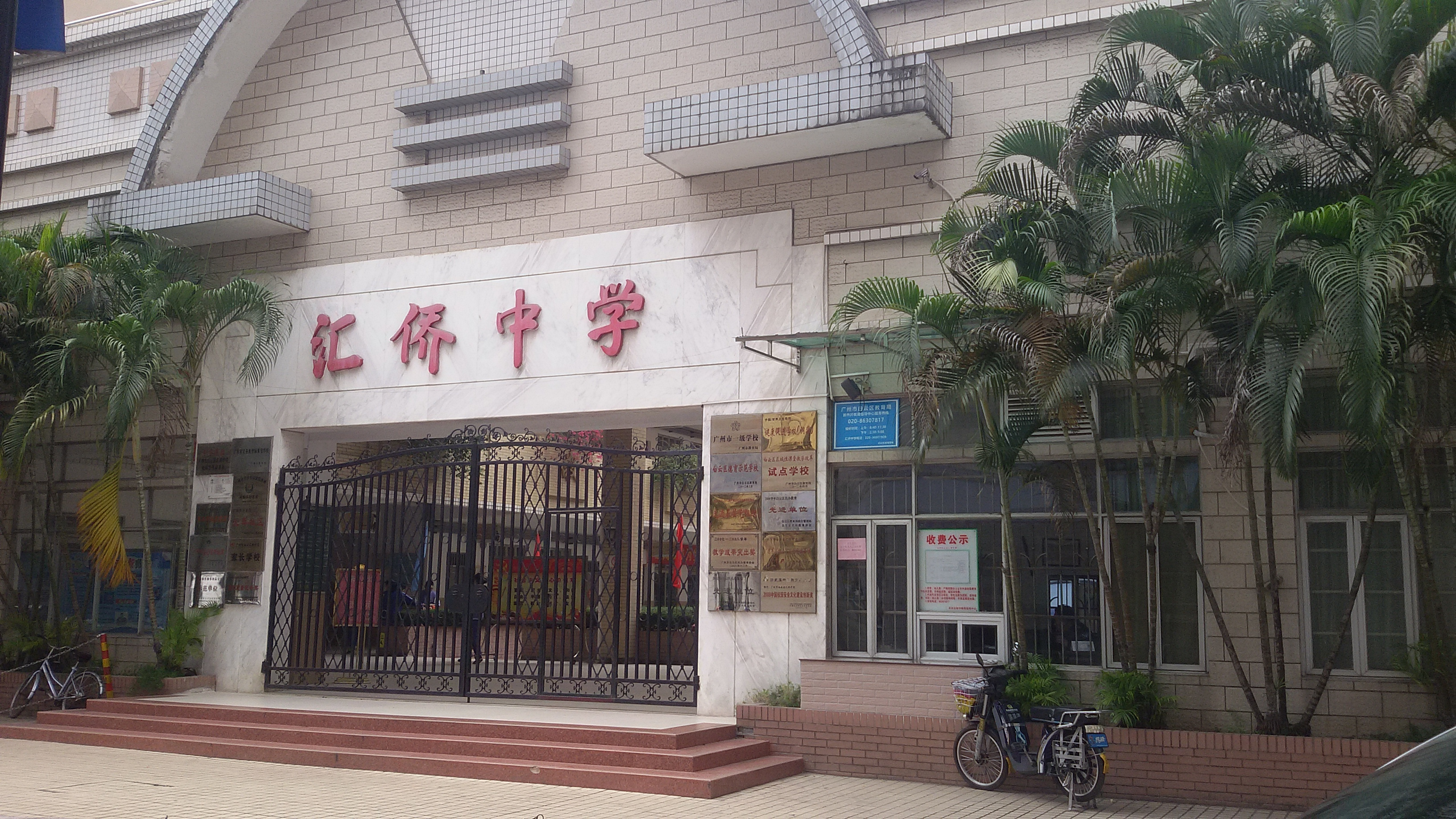 粵語: 滙僑中學嘅大門